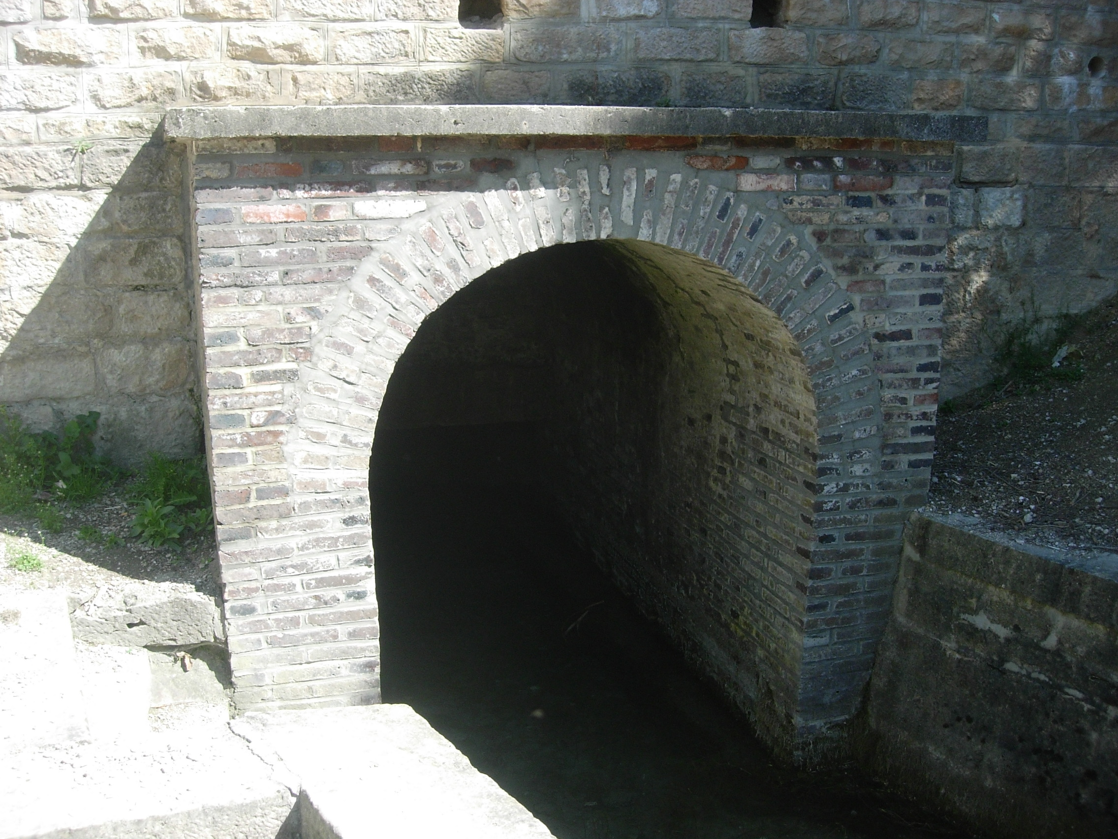 Source de la Vanne (Rivière de l'Aube) à Fontvannes